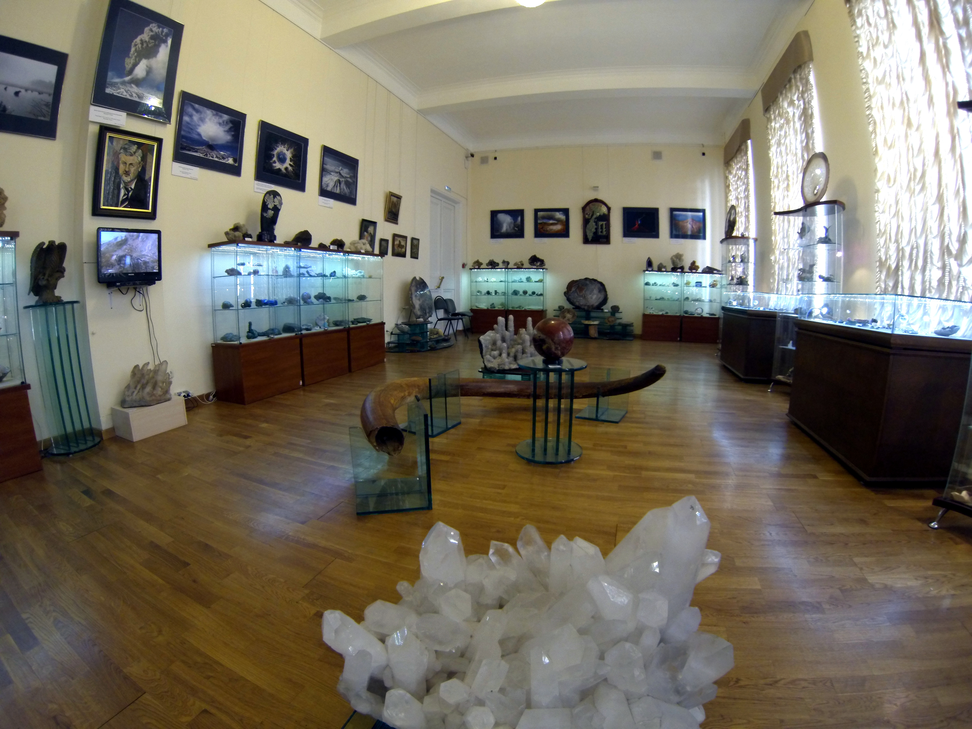 Государственный геологический музей имени В. И. Вернадского РАН, Коллекция С. М. Миронова